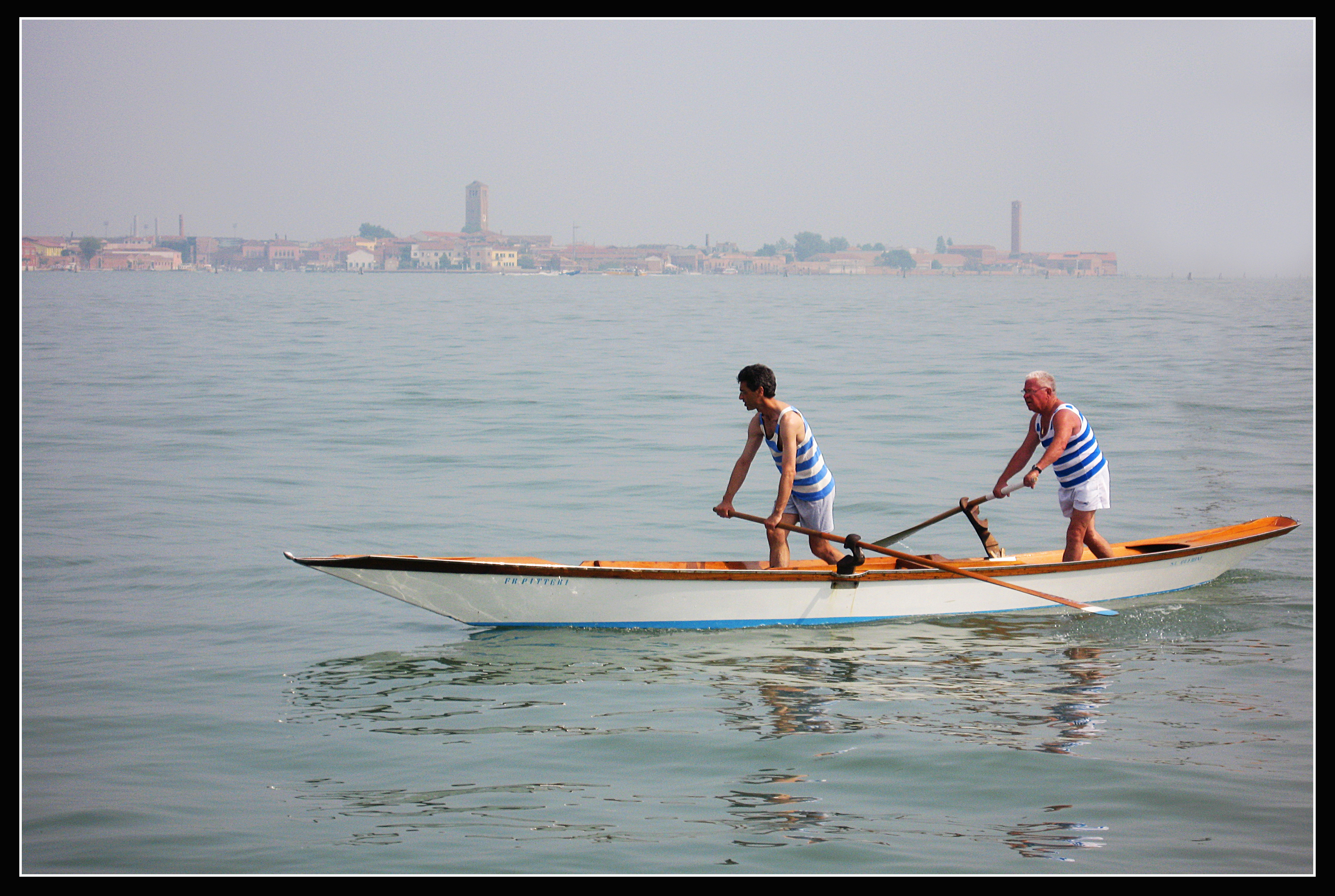 Laguna Véneta